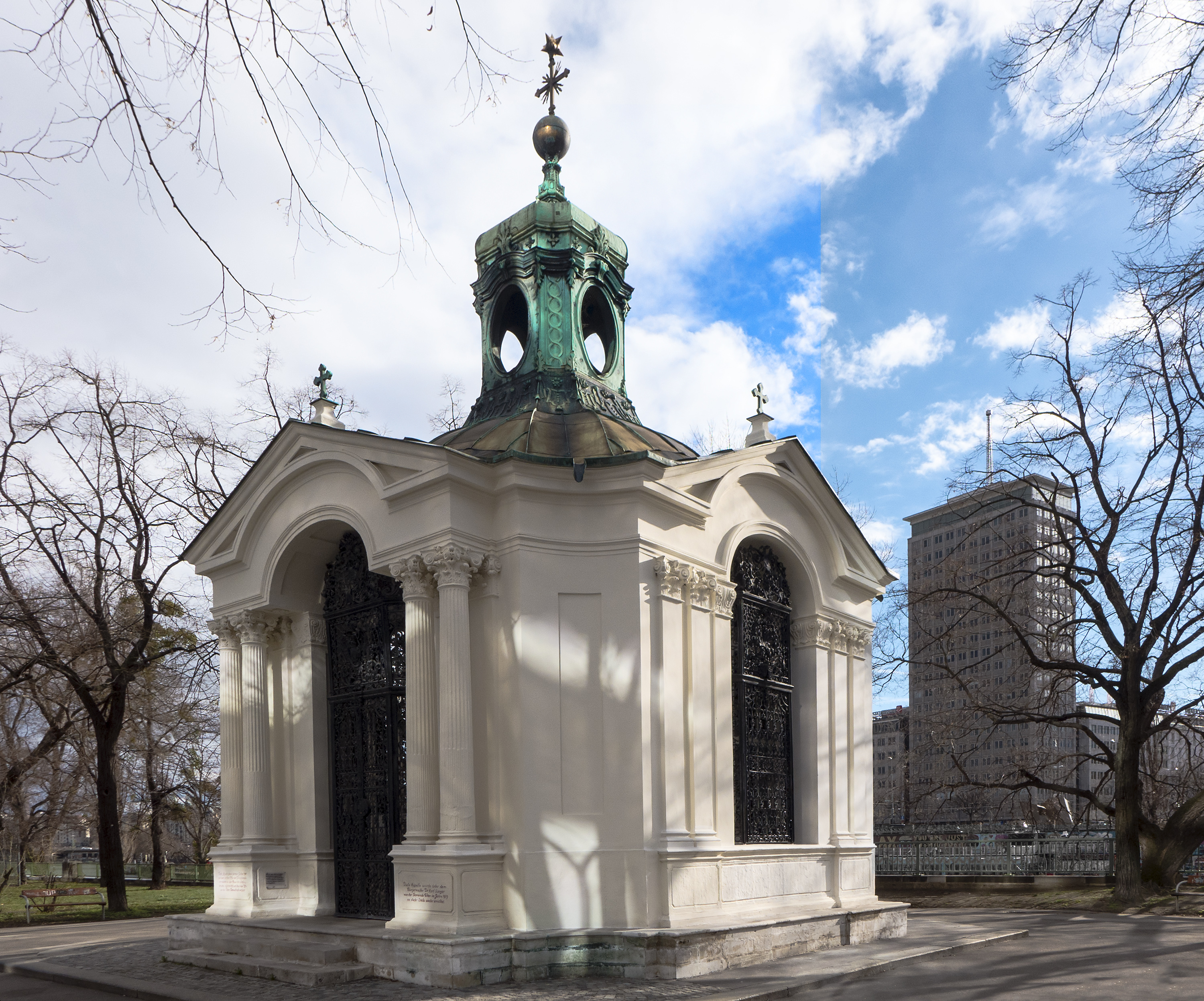 Johann-Nepomuk-Kapelle in Wien 2